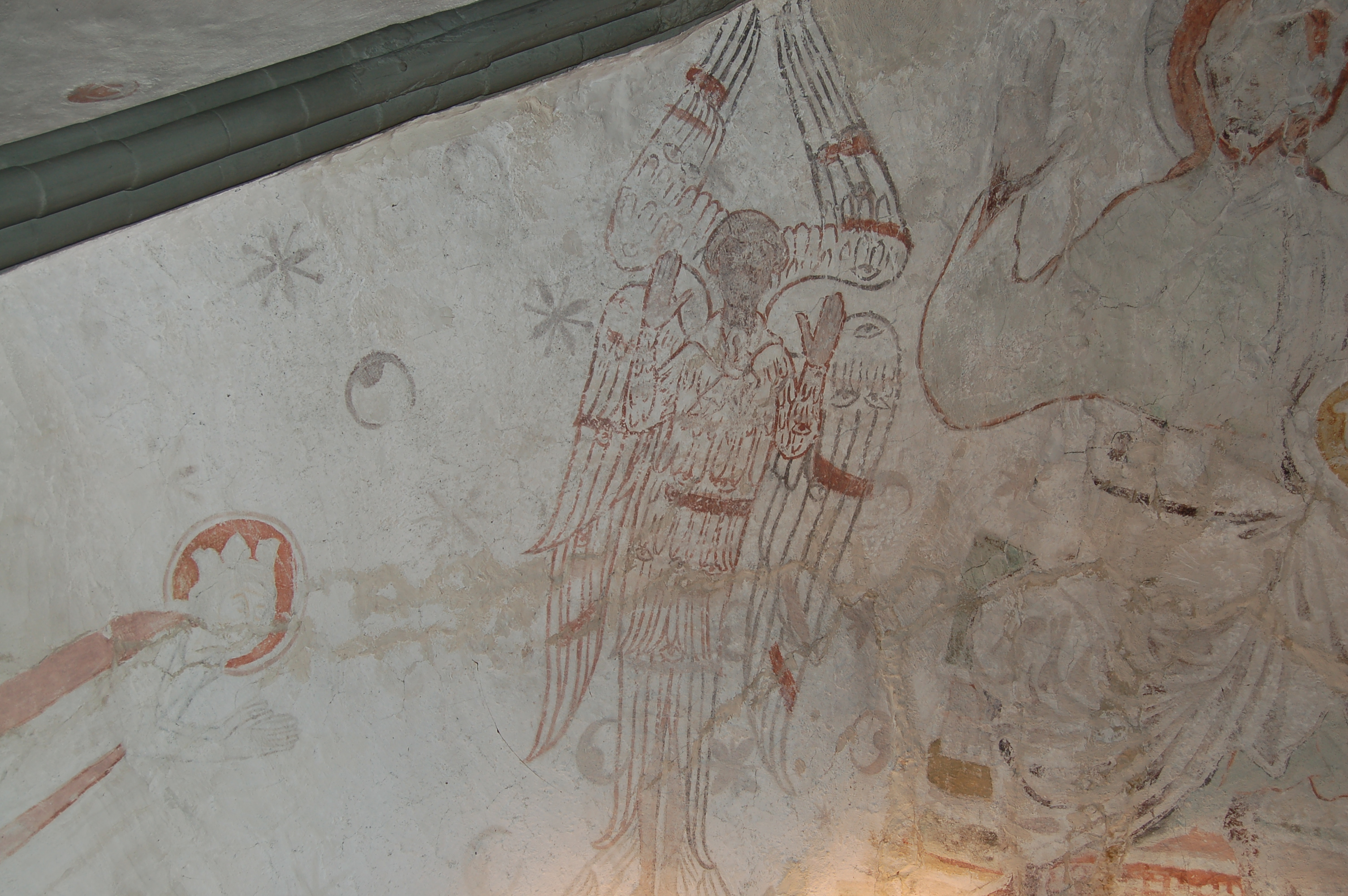 Seraf i Alstadhaug kirke i Skogn